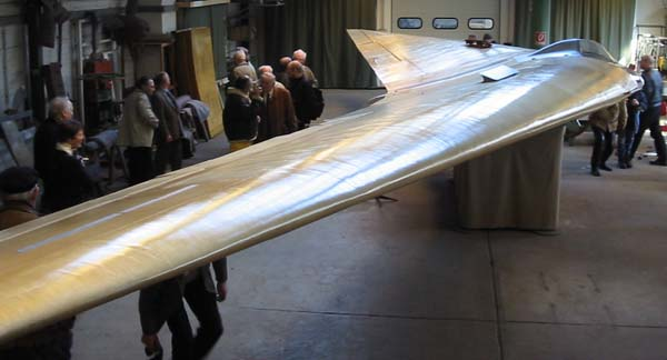 Horten H.IIIf bei einer Präsentation am 21.2.2004 nach der Restaurierung durch das Deutsche Technikmuseum Berlin